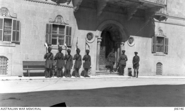 מפקדת קורפוס המדבר הרכוב בחלב - גנרל הנרי שובל השמאלי בין שלושת הקצינים שבפתח הבניין